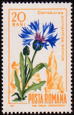 Marcă poștală cu Albăstreaua de munte